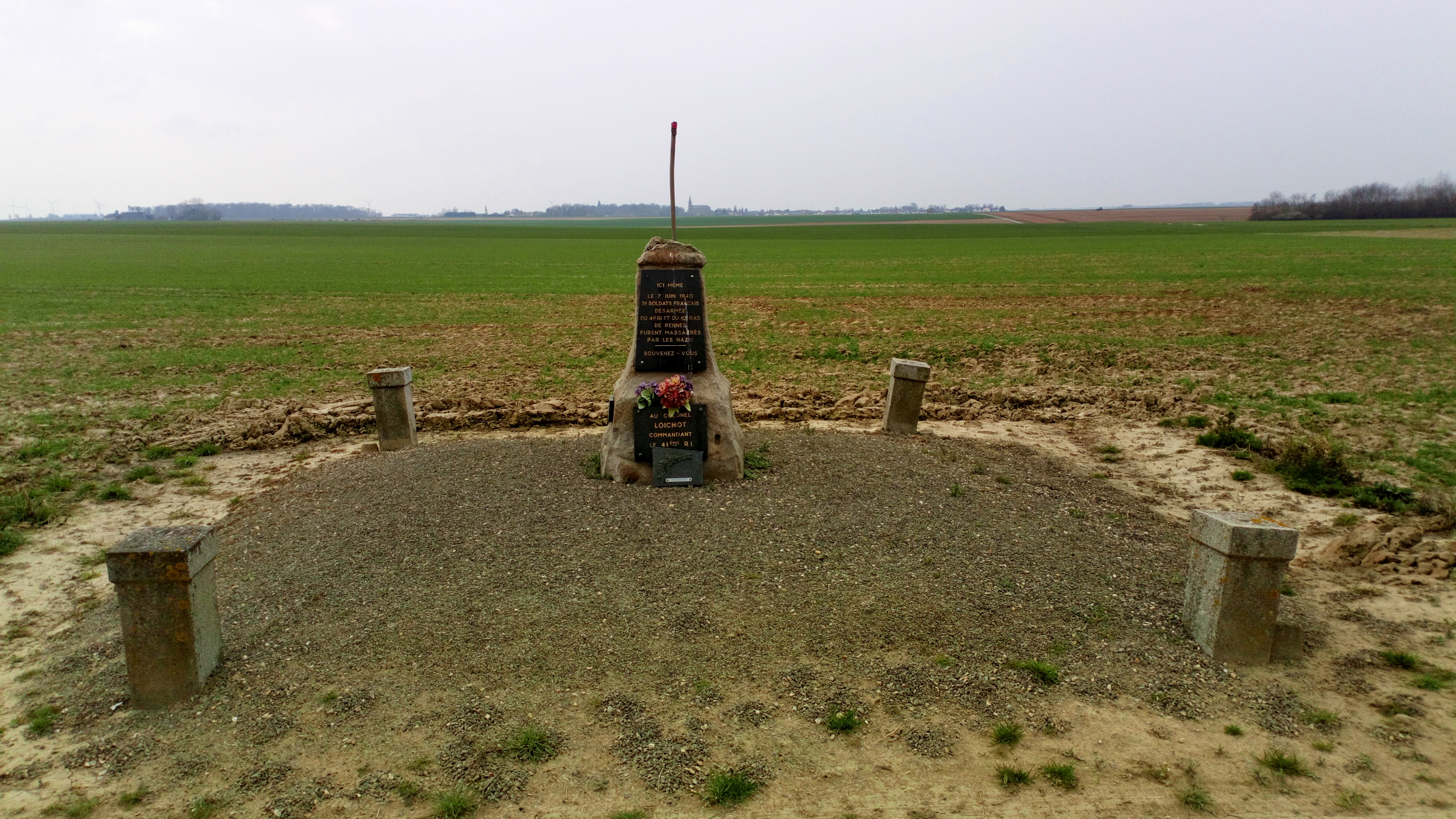 Beaufort-en-Santerre, stèle aux soldats des 41e R.I. et 10e R.A.D. massacrés le 7 juin 1940 1